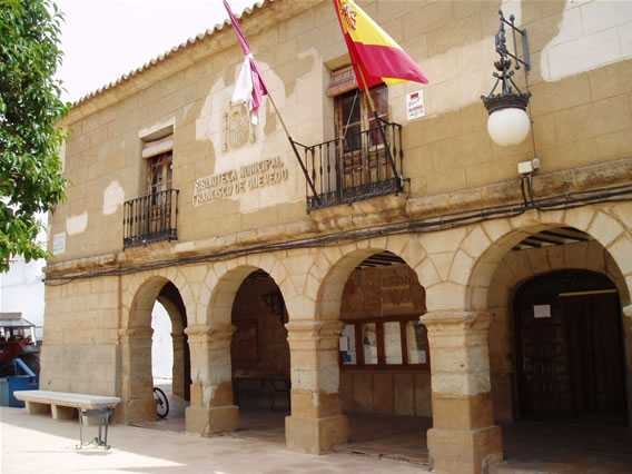 Casa de la Tercia de Torre de Juan Abad